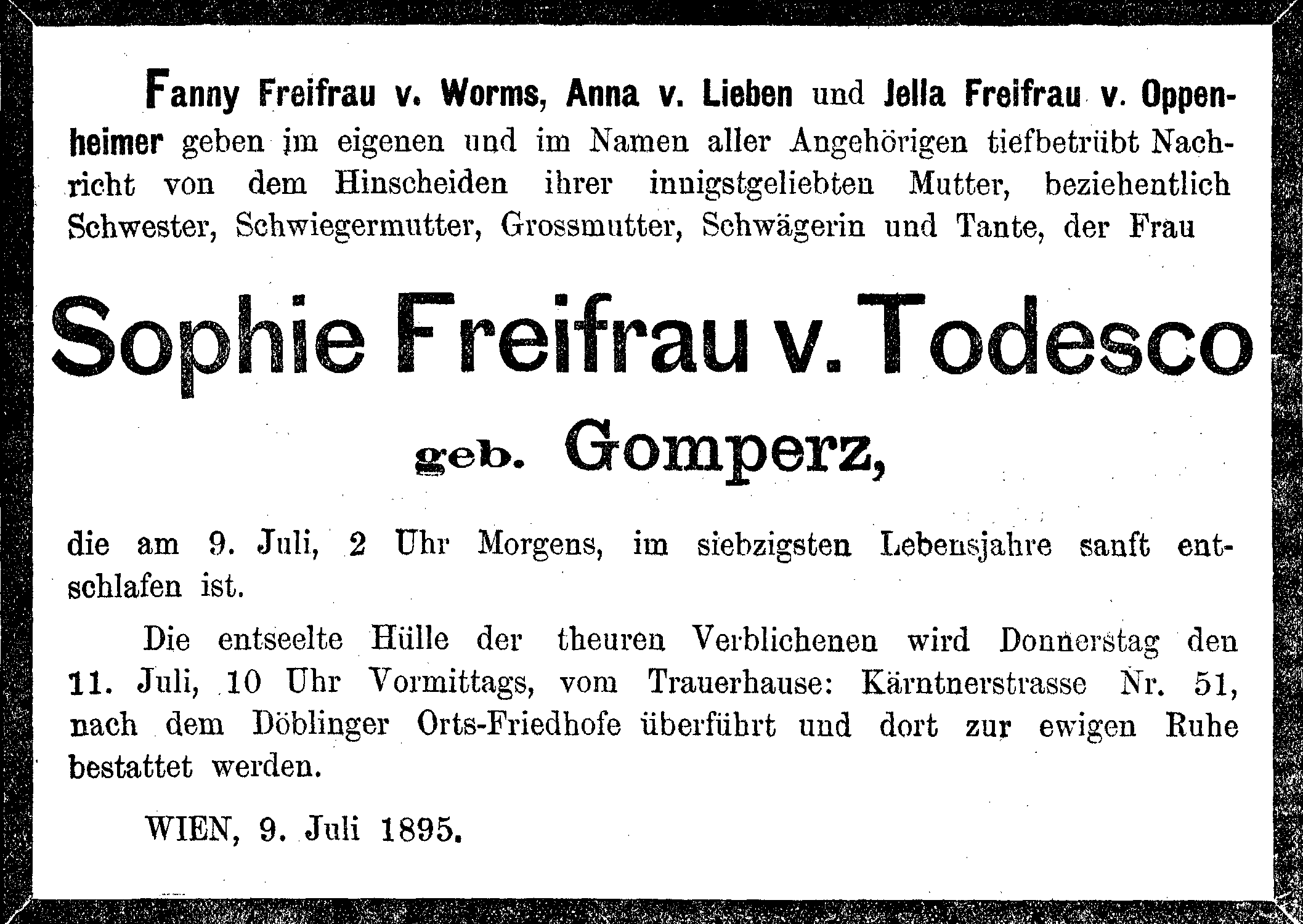 Todesanzeige der Sophie von Todesco